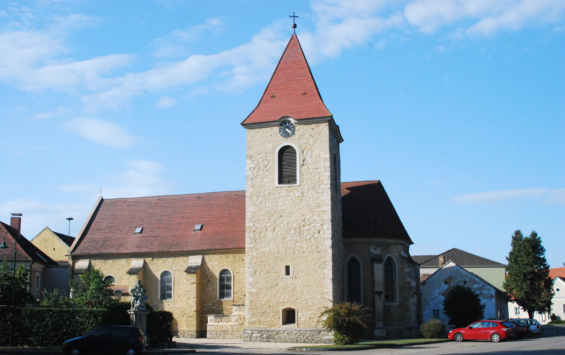 katholische Pfarrkirche heilige Katharina